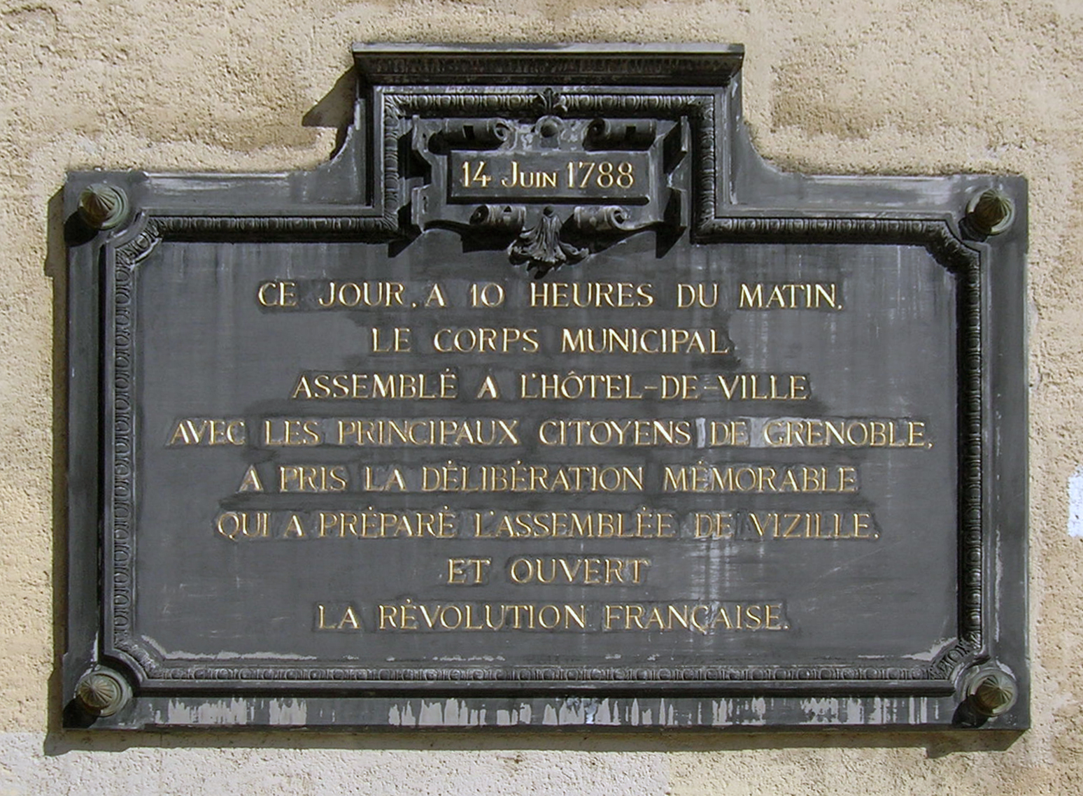 Plaque de la Révolution française à l'entrée de l'Hôtel de Lesdiguières, jardin de ville, Grenoble, Isère, AuRA, France. 14 juin 1788 Ce jour, à 10 heures du matin, le corps municipal assemblé à l'Hôtel-de-ville avec les principaux citoyens de Grenoble a pris la délibération mémorable qui a préparé l'assemblée de Vizille et ouvert la Révolution Française.